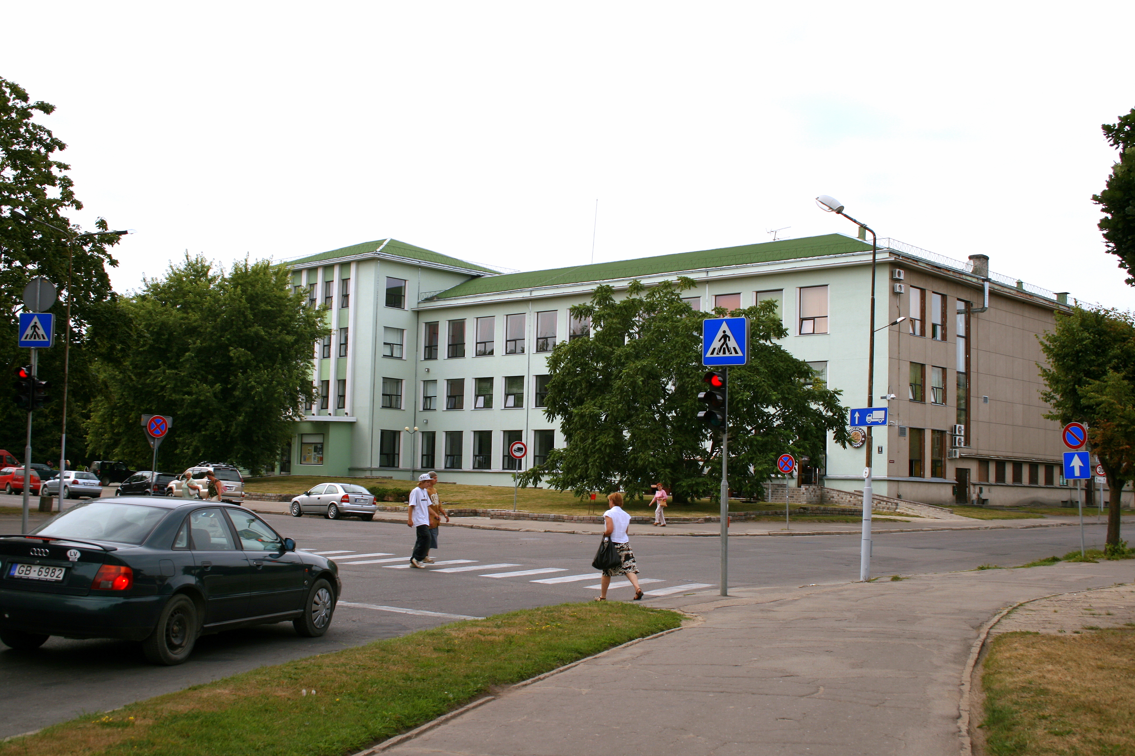 Jelgavas kultūras nams